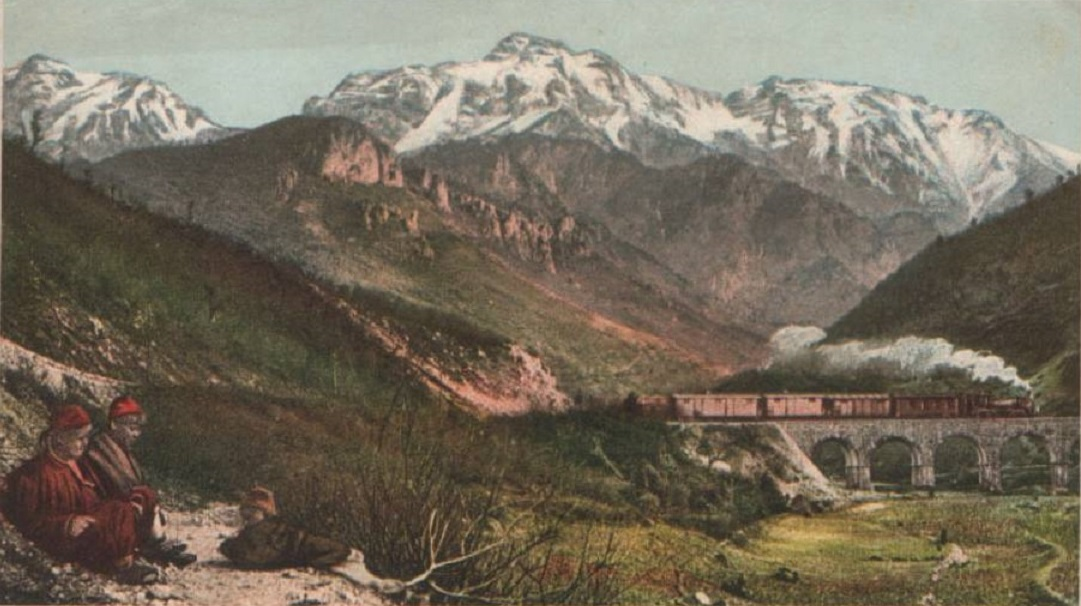 Narentabahn: Brücke über die Narenta bei Prenjalpe südlich von Jablanica